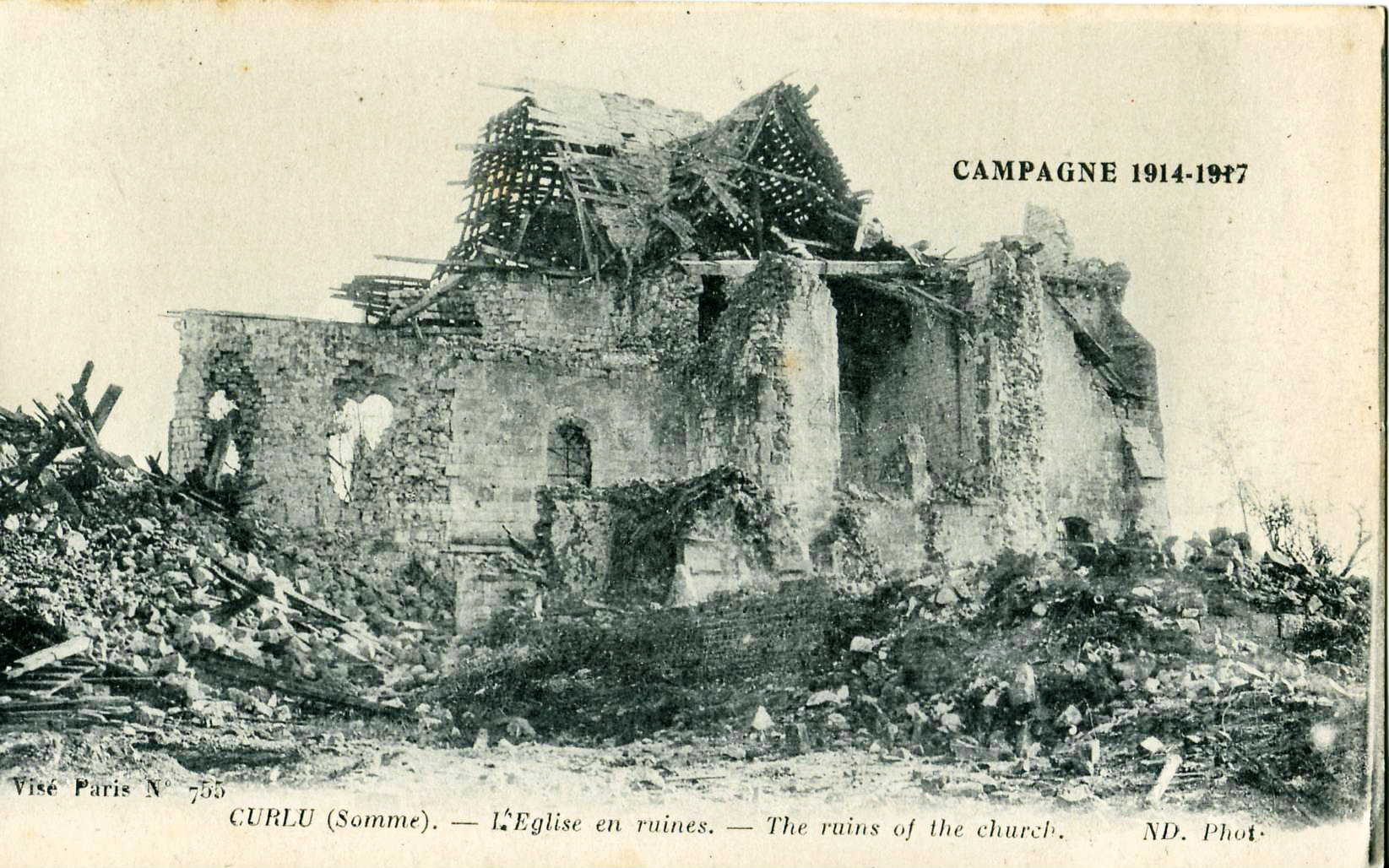 Carte postale ancienne éditée par ND, collection Campagne 1914-1917 :CURLU - L'église en ruines